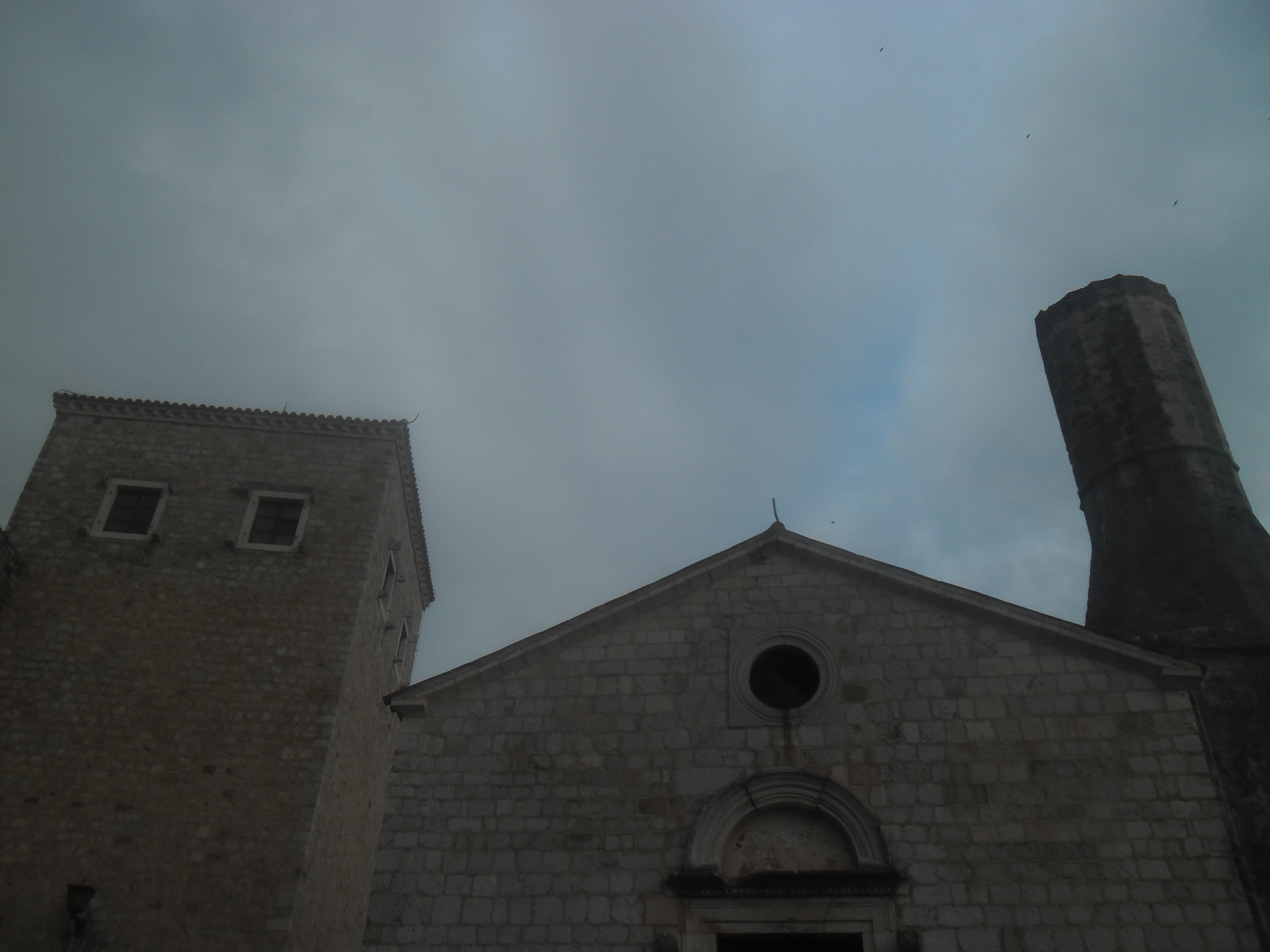 Ulcinj